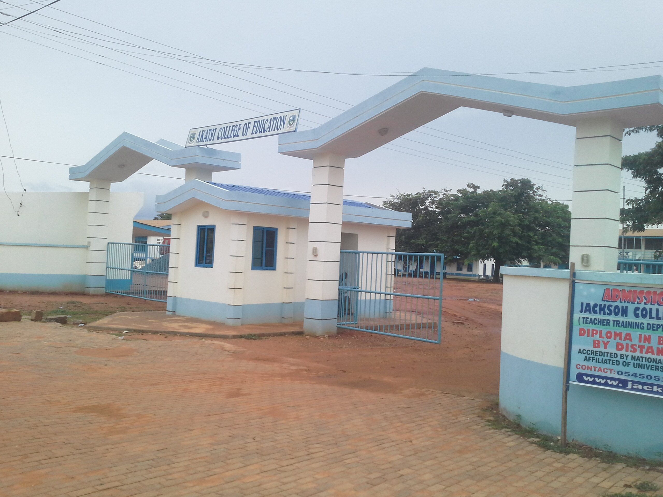 AKATSICO main entrance